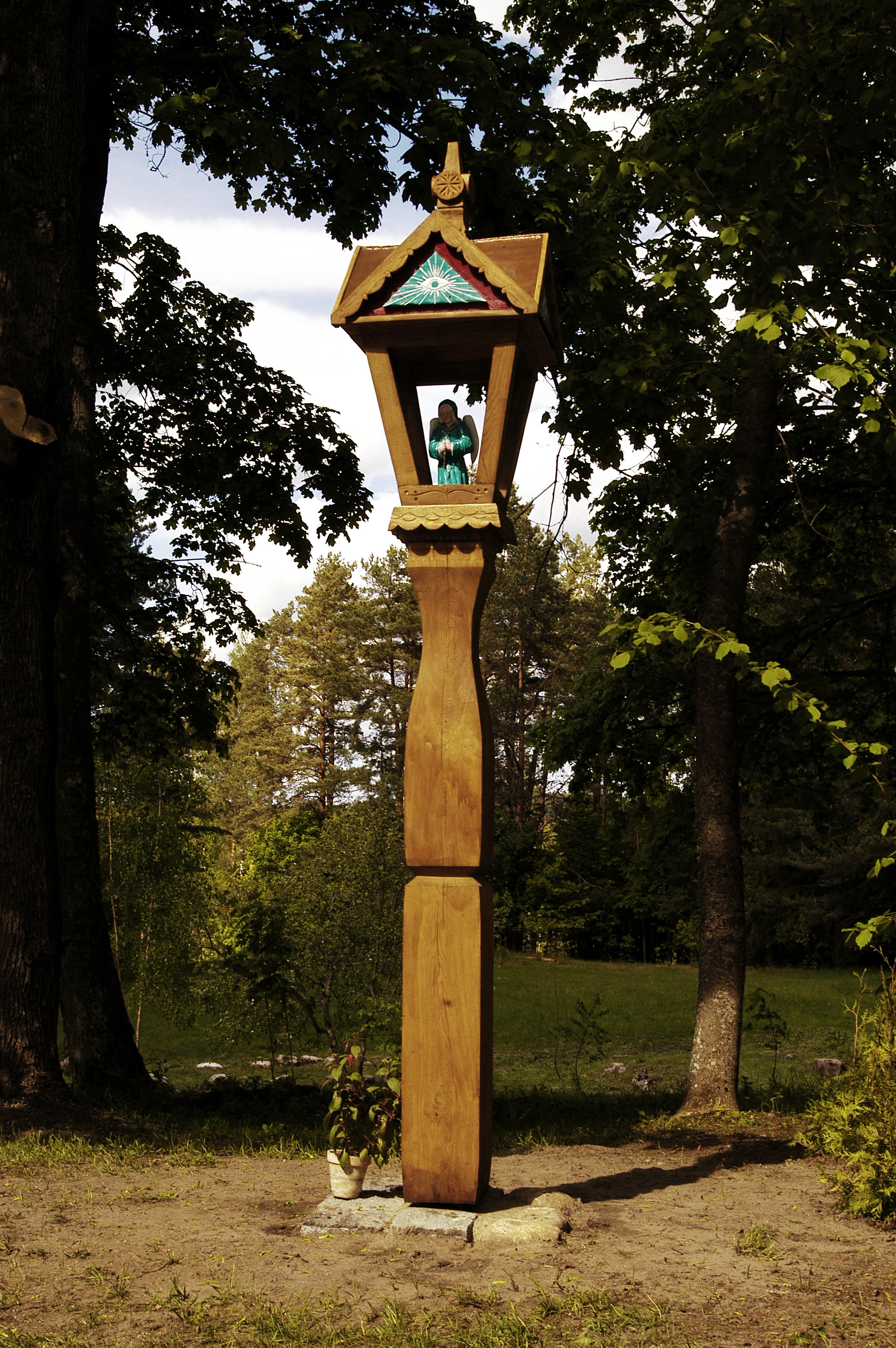 Koplytstulpis Pačiaunės vienkiemyje ten gyvenusioms visoms Brogų kartoms atminti. Drožė Saulius Savickas pagal Gintauto Kažemėko projektą.